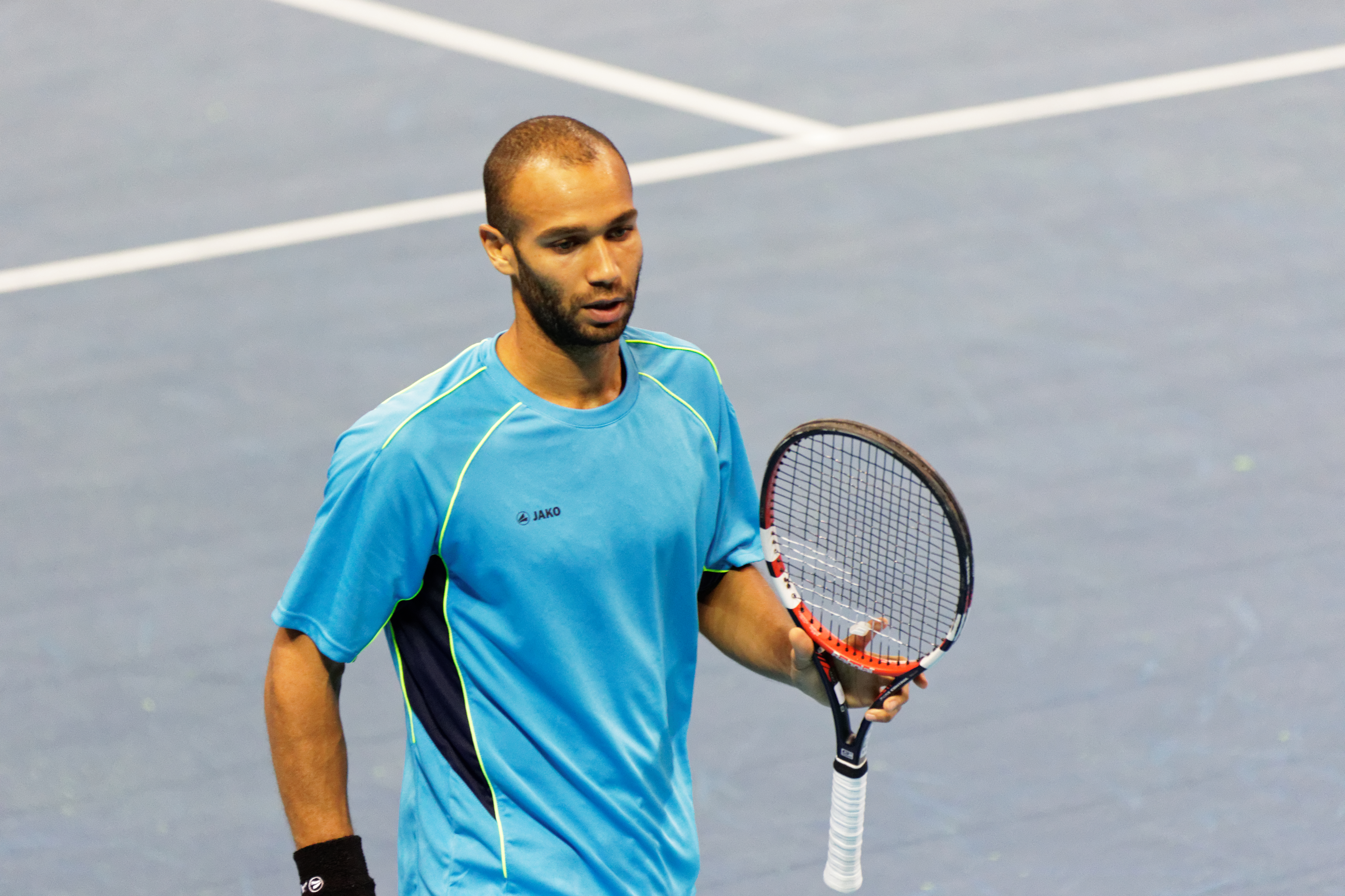 Rencontre entre Sadio Doumbia - Maxime Tabatruong et Ilija Bozoljac - Antonio Sancic lors du huitième de final de l'Open de Brest Arena 2015.Ilija Bozoljac et Antonio Sancic gagneront en deux sets.